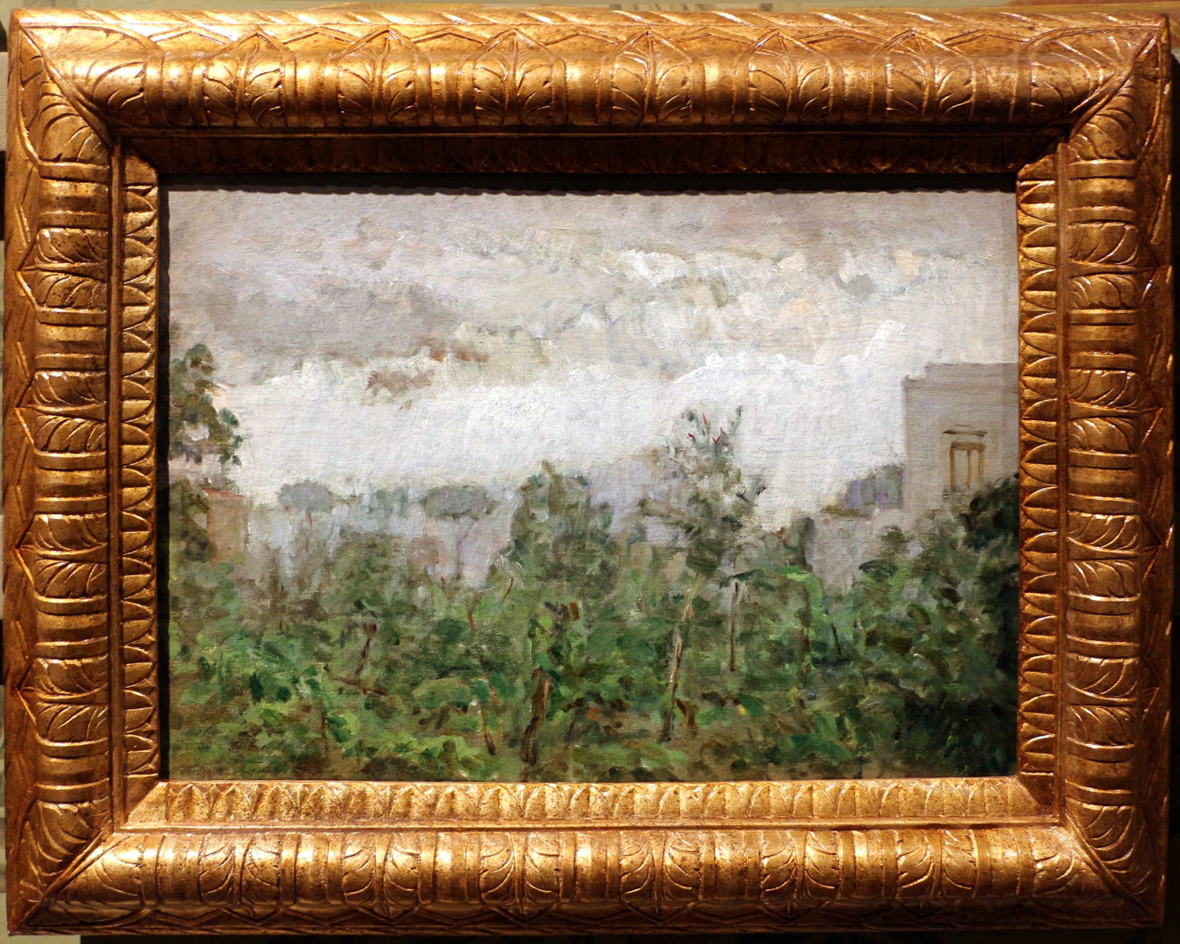 la Pioggiatitle QS:P1476,it:"la Pioggia" label QS:Lit,"la Pioggia"